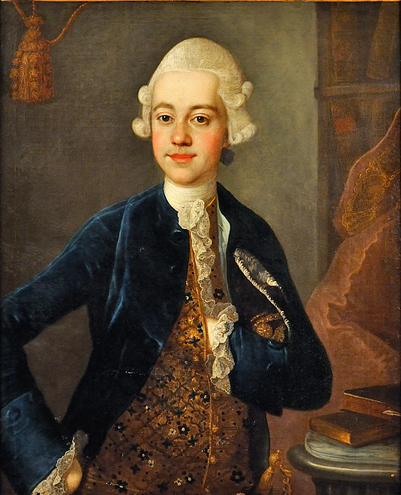 Bildnis von Renatus Leopold Christian von Senckenberg (1751–1800), der Sohn von Heinrich Christian von Senckenberg, Wiener Reichshofrat und Jurist, Neffe von Johann Christian Senckenberg.